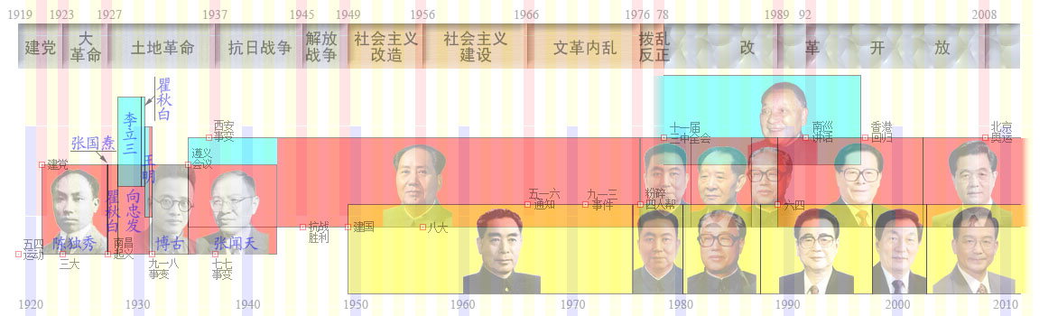 图形化显示中共党史首脑。 数据由维基百科。图形精确至月。